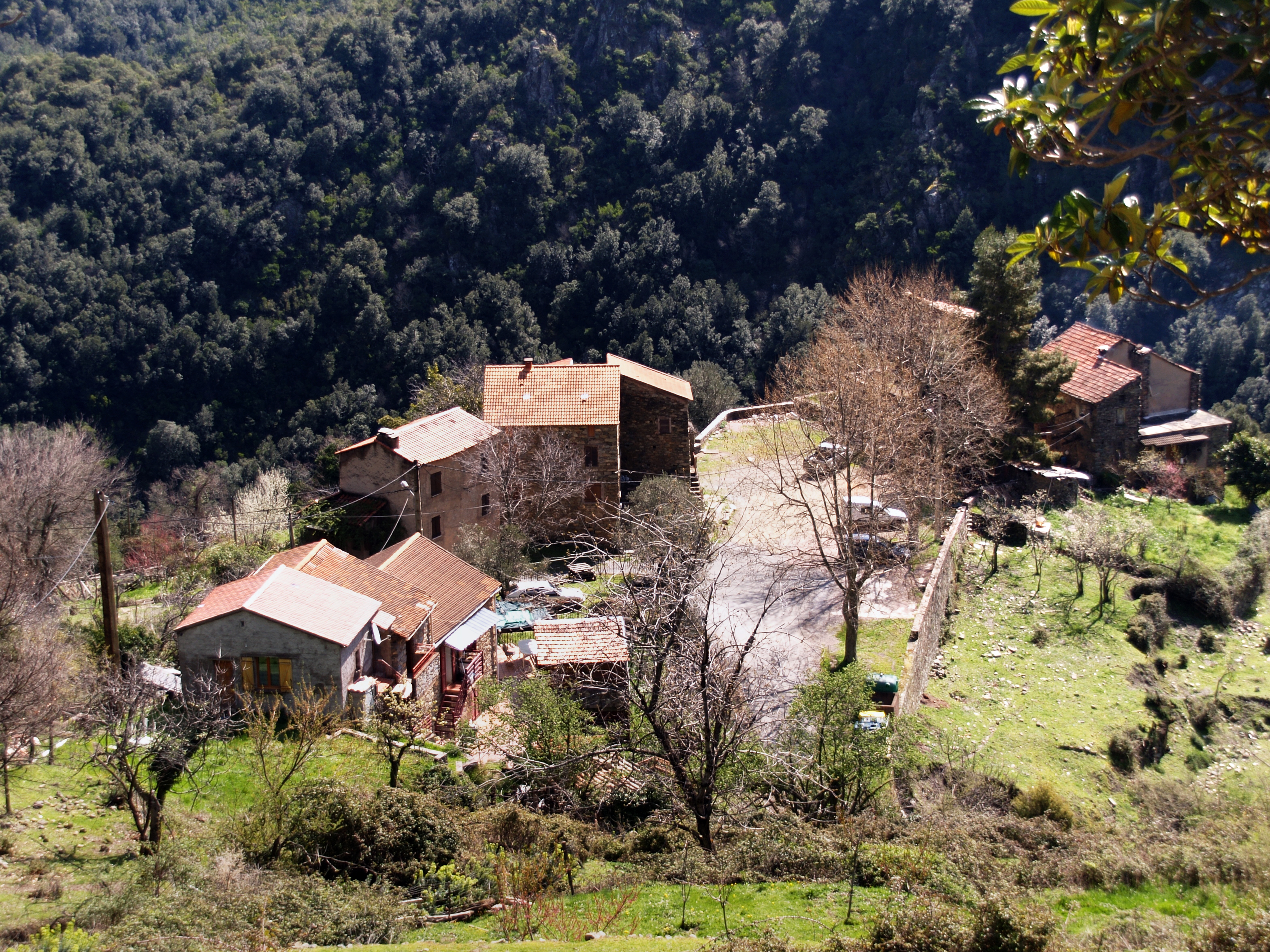 Lano (Corsica) - Vue du village